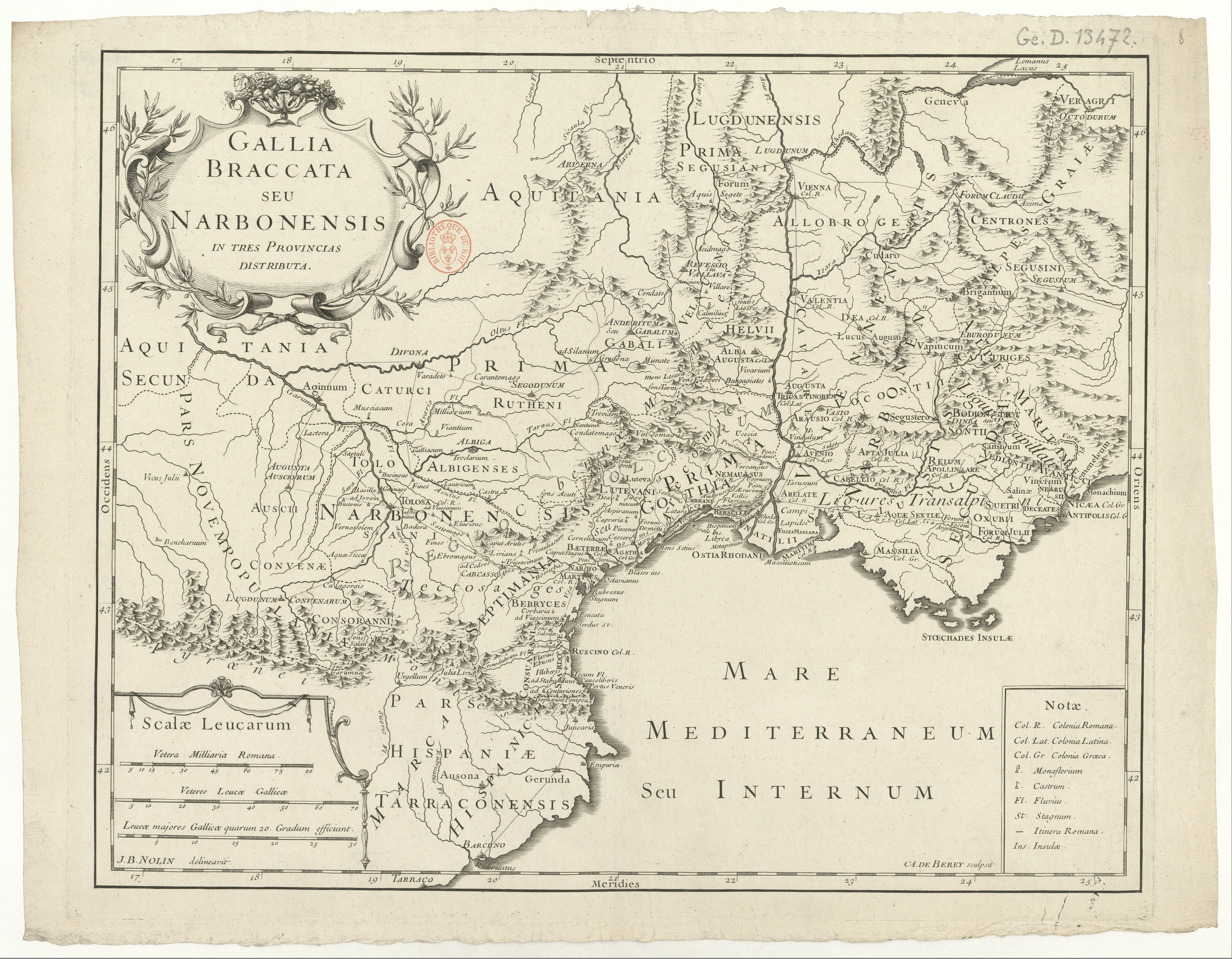 Gallia braccata seu narbonensis, in tres provincias distributa / J. B. Nolin delineavit ; C. A. de Berey, sculpsit. Vetera milliaria romana 90 [= 0m. 085] leucae majores Galliae quarum 20 gradum efficiunt 30